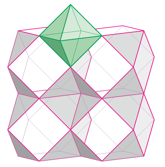 塩化セシウム